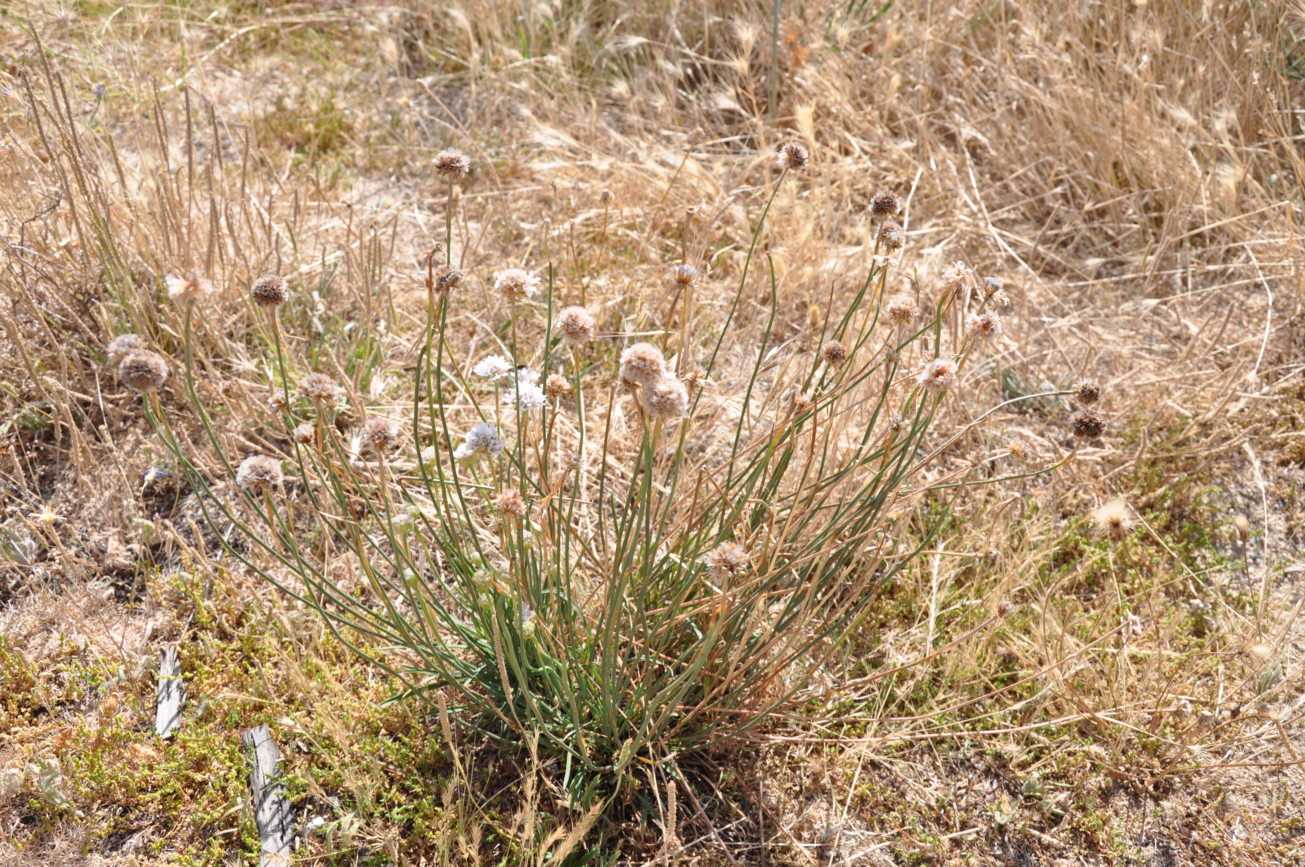 Candelas (Armeria arenaria), LaTorre-Ávila, España.